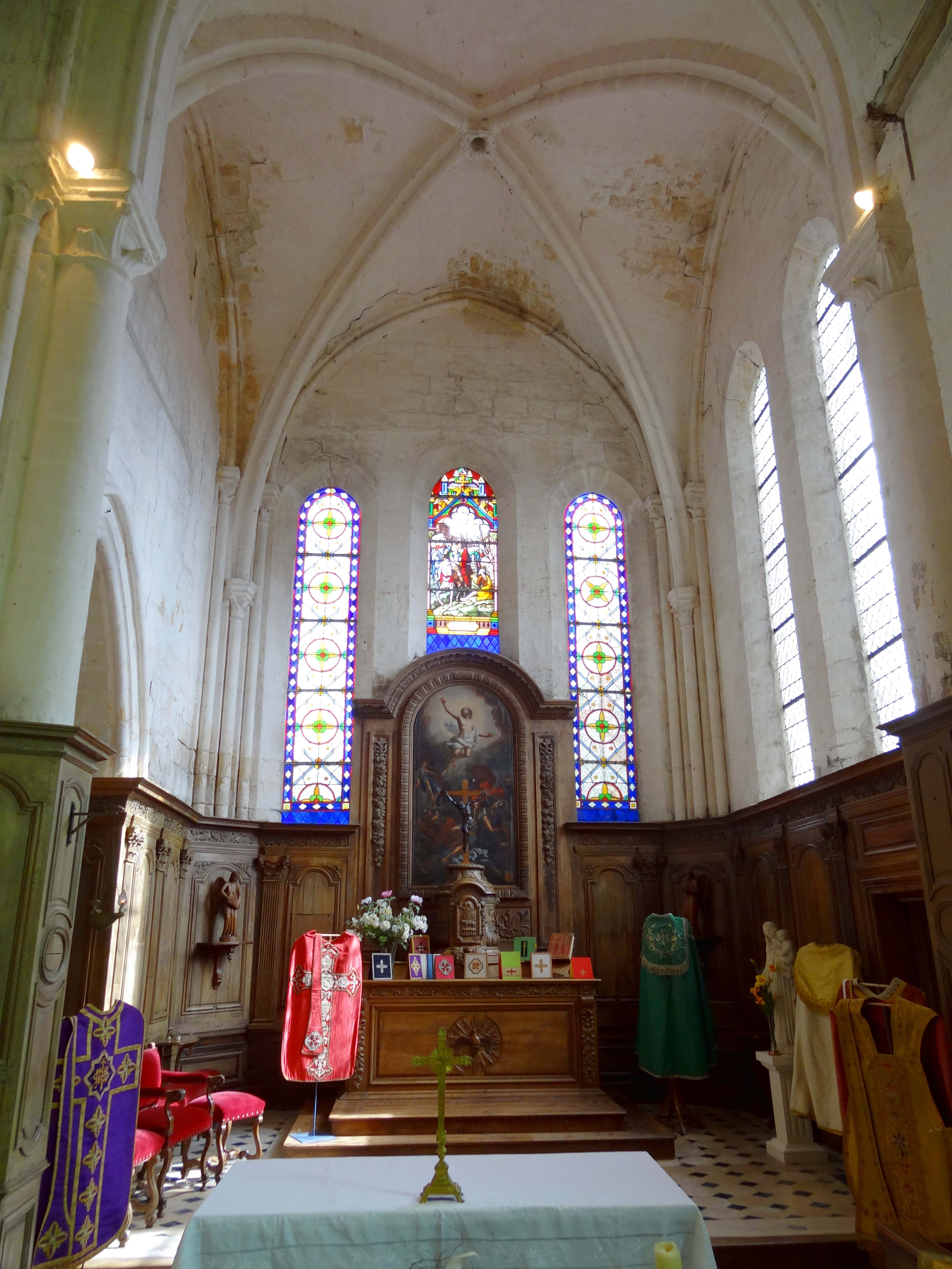 Intérieur de l'église - voir titre.